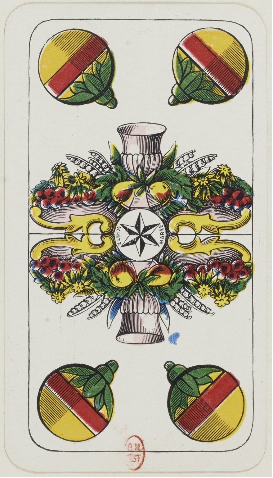 Tuz dzwonkowy z wzoru wuntemburskiego